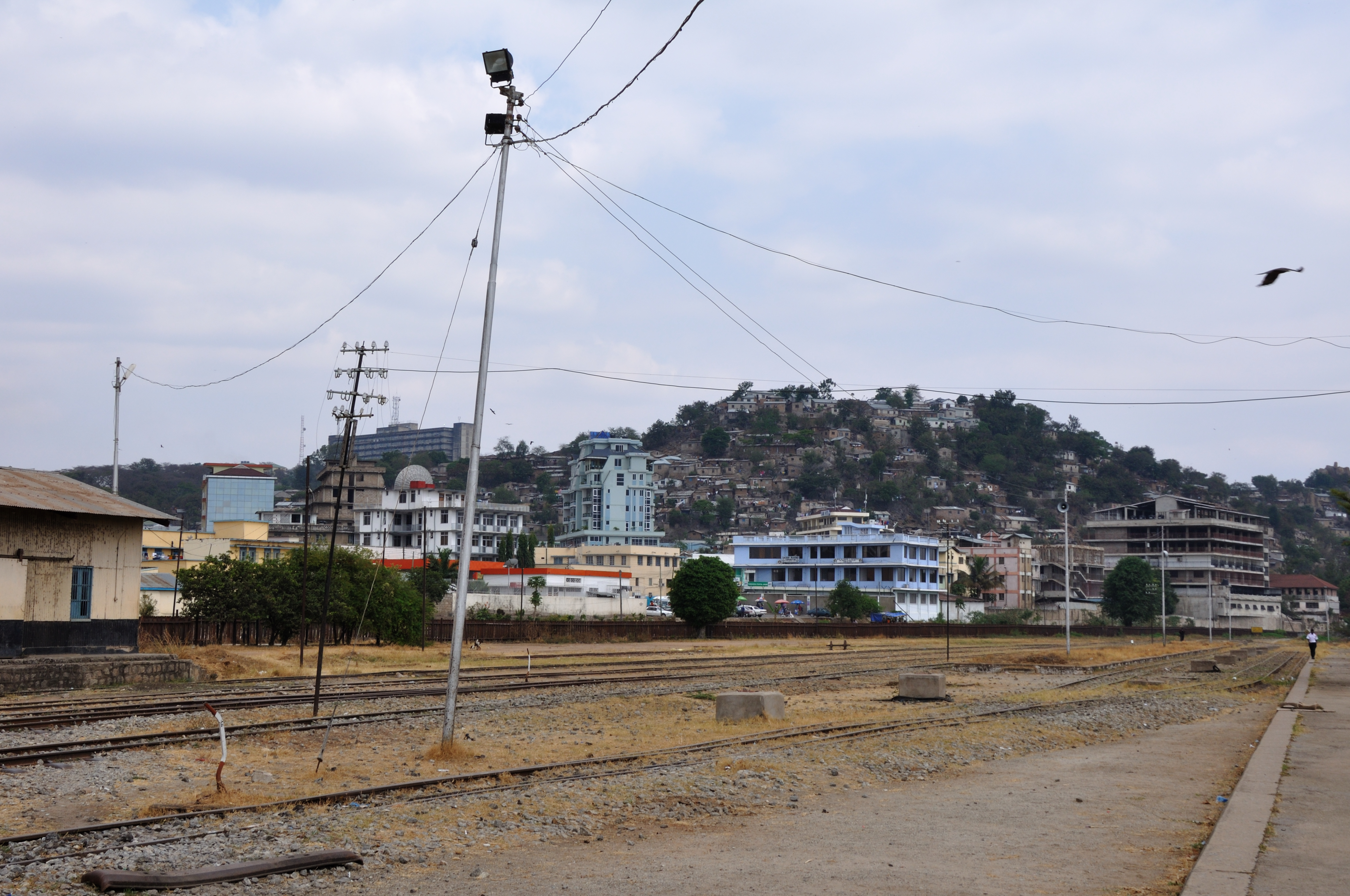 Tanzania, views in Mwanza